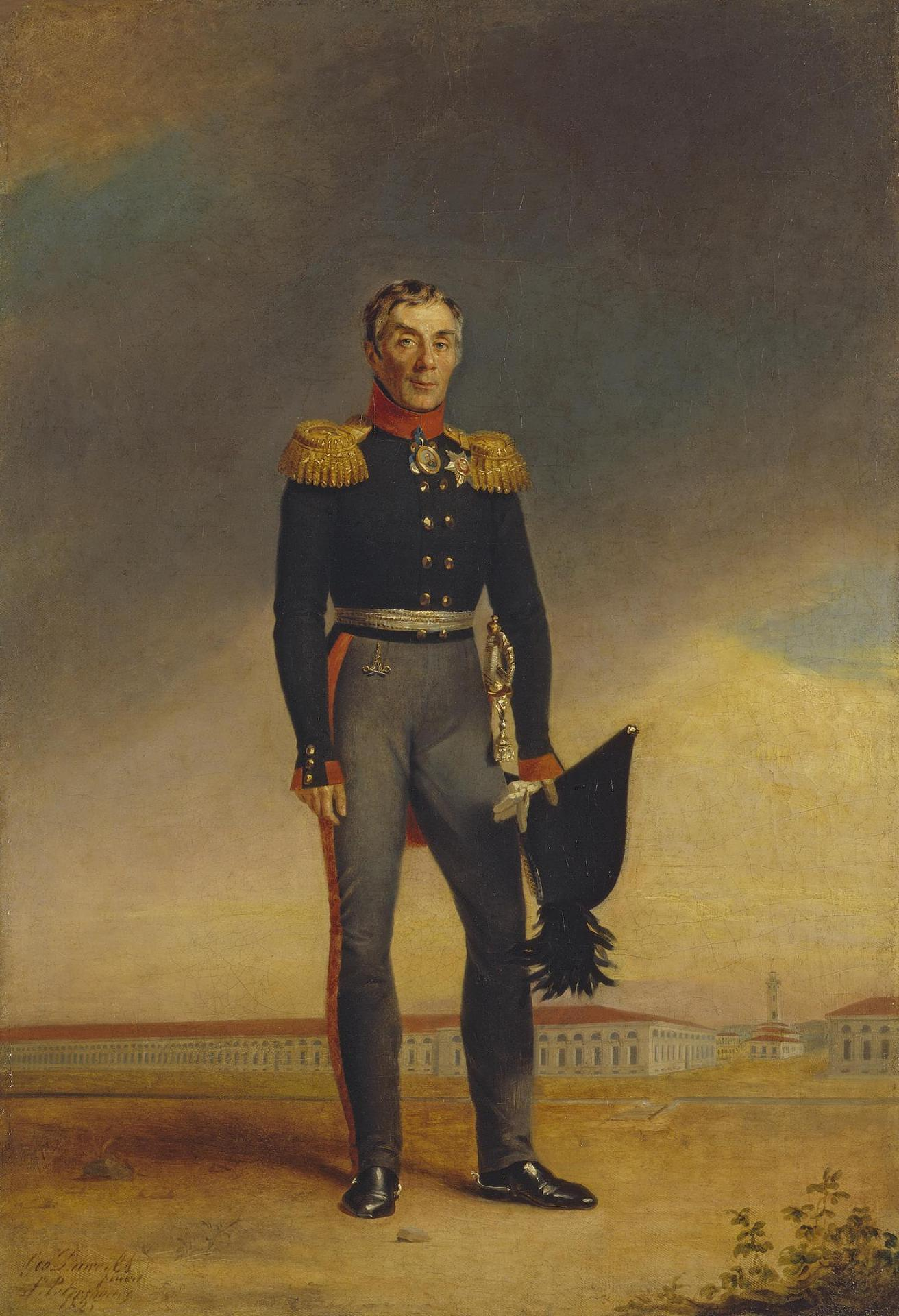 Портрет графа А.А. Аракчеева. Картина поступила в Эрмитаж в 1951 году из Артеллерийского исторического музея.